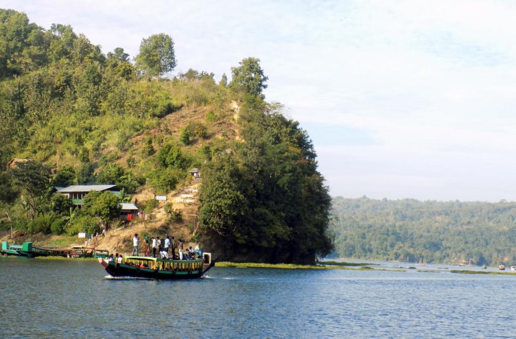 কাপ্তাই লেক,রাঙ্গামাটি